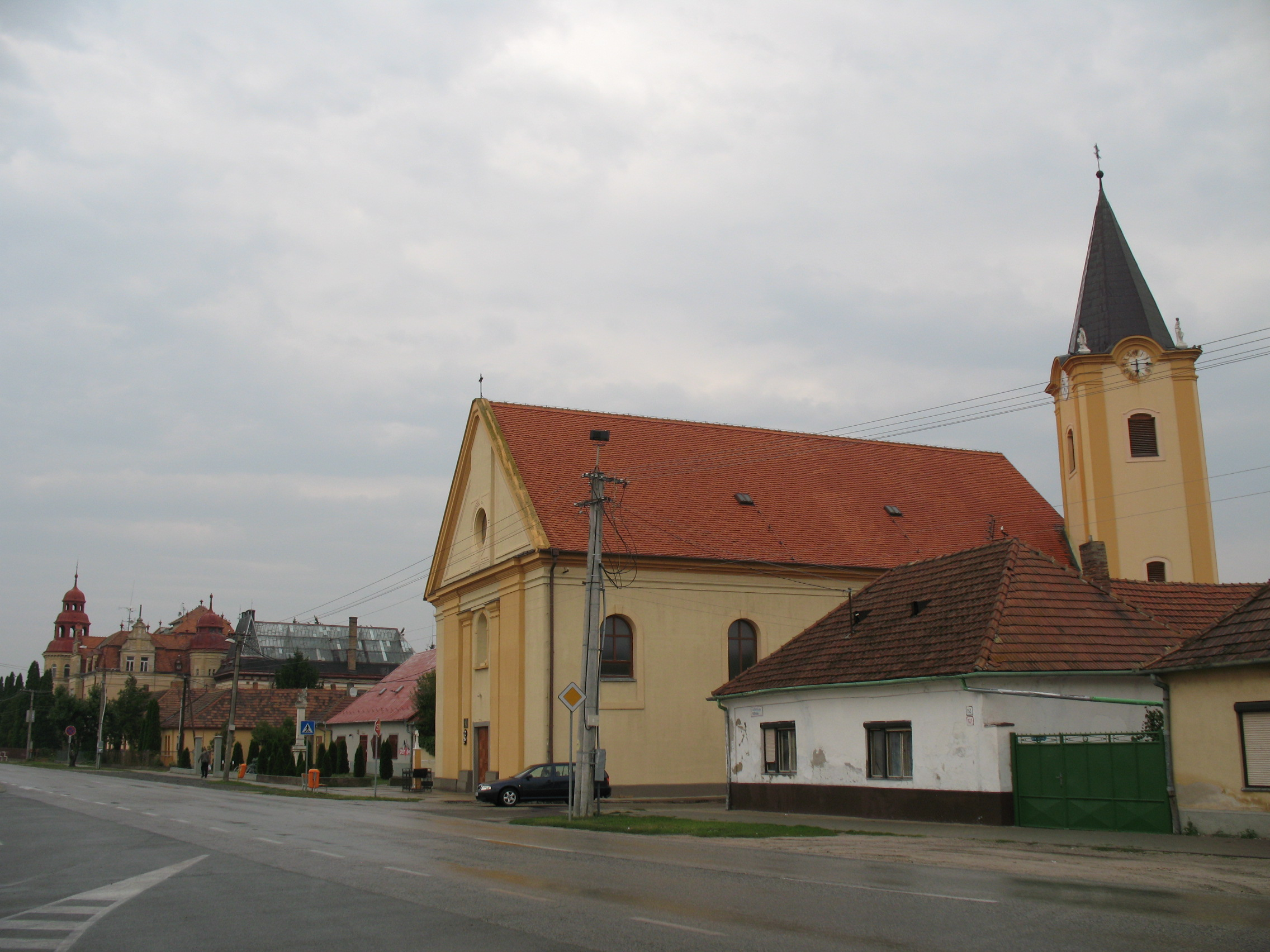 Diószeg